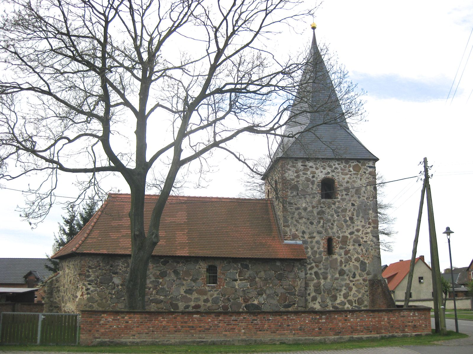 Dorfkirche von Bonese (Dähre / Altmarkkreis)